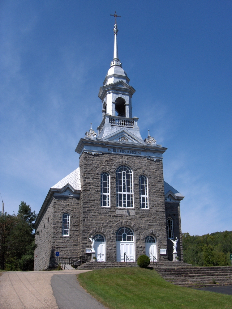 Église Saint-Bernardin, Rivière-à-Pierre, Portneuf, Québec, Canada